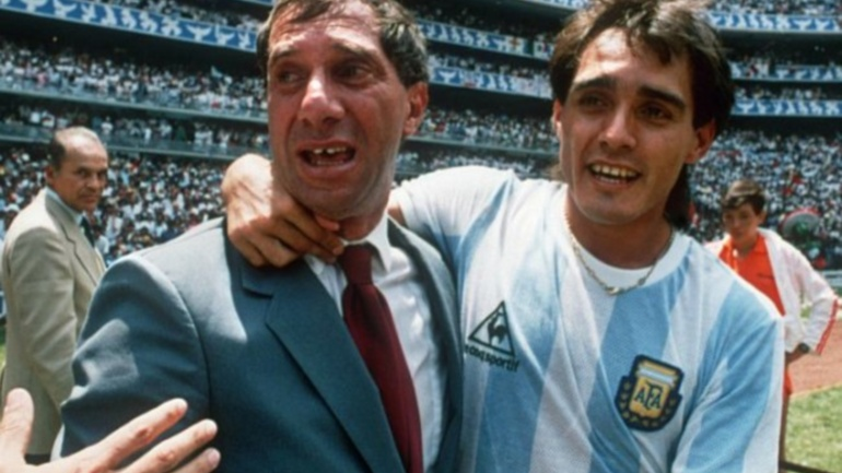 Carlos Bilardo festejando el campeonato de México 86.